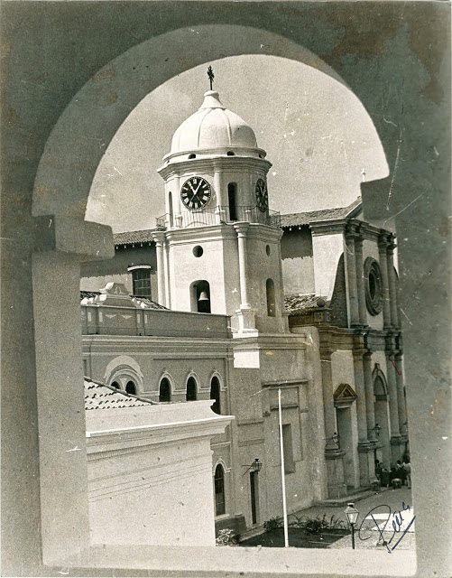 Catedral de Barquisimeto, hoy en día Iglesia de San Francisco (1901)